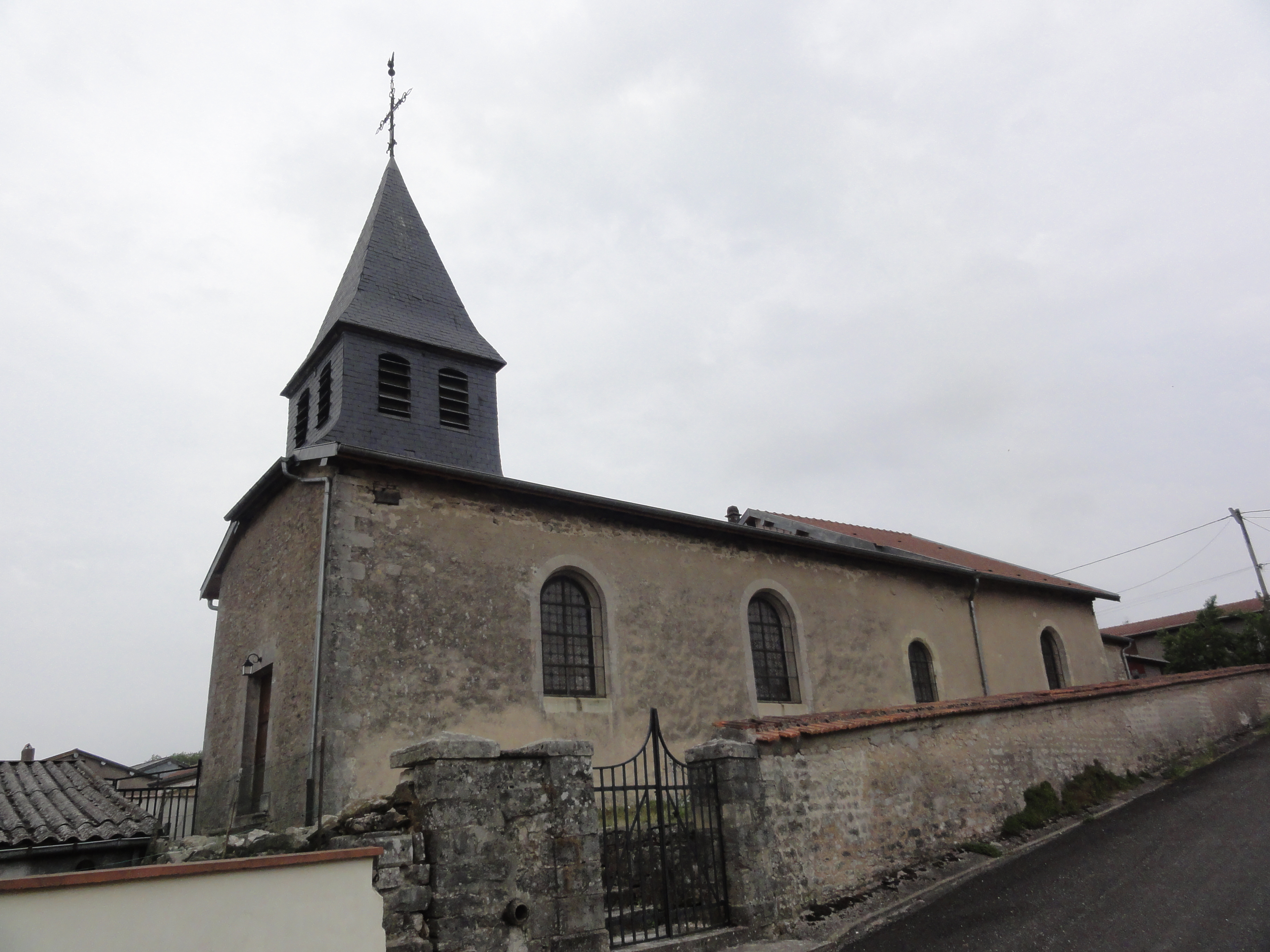 Ville-sur-Cousances (Meuse) église